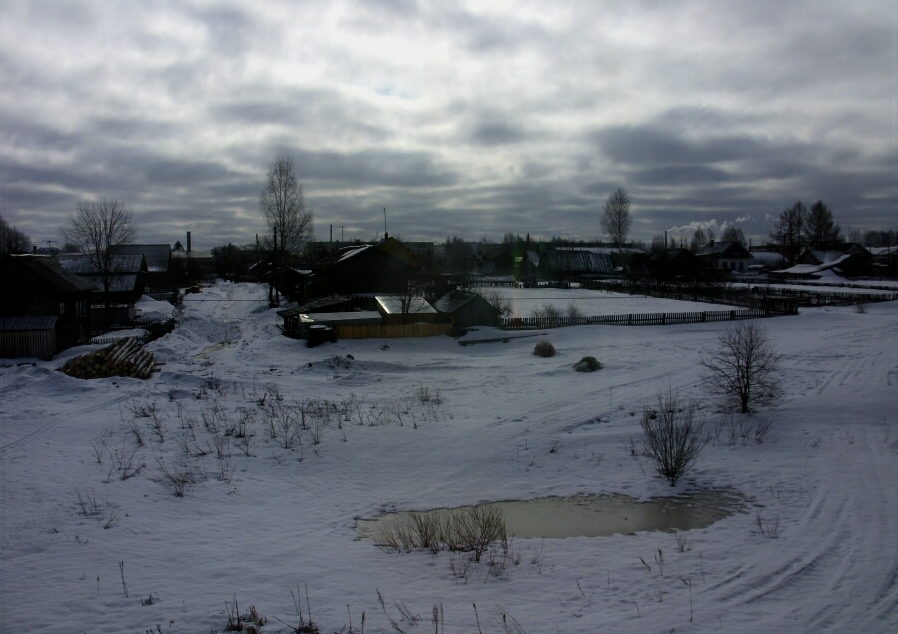 Котельнич - город в России, административный центр Котельничского района Кировской области. Является водным и железнодорожным узлом, смыкающим Северную и Горьковскую железные дороги. Важнейшими автодорожными путями являются отходящие от Котельнича тракты на Киров, Советск, Яранск и Даровской.